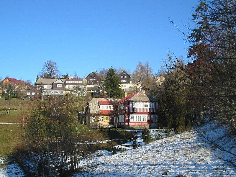 Čelní pohled na Rychtrovu boudu na Benecku v Krkonoších z hlavní silnice, pořízeno v jarním období